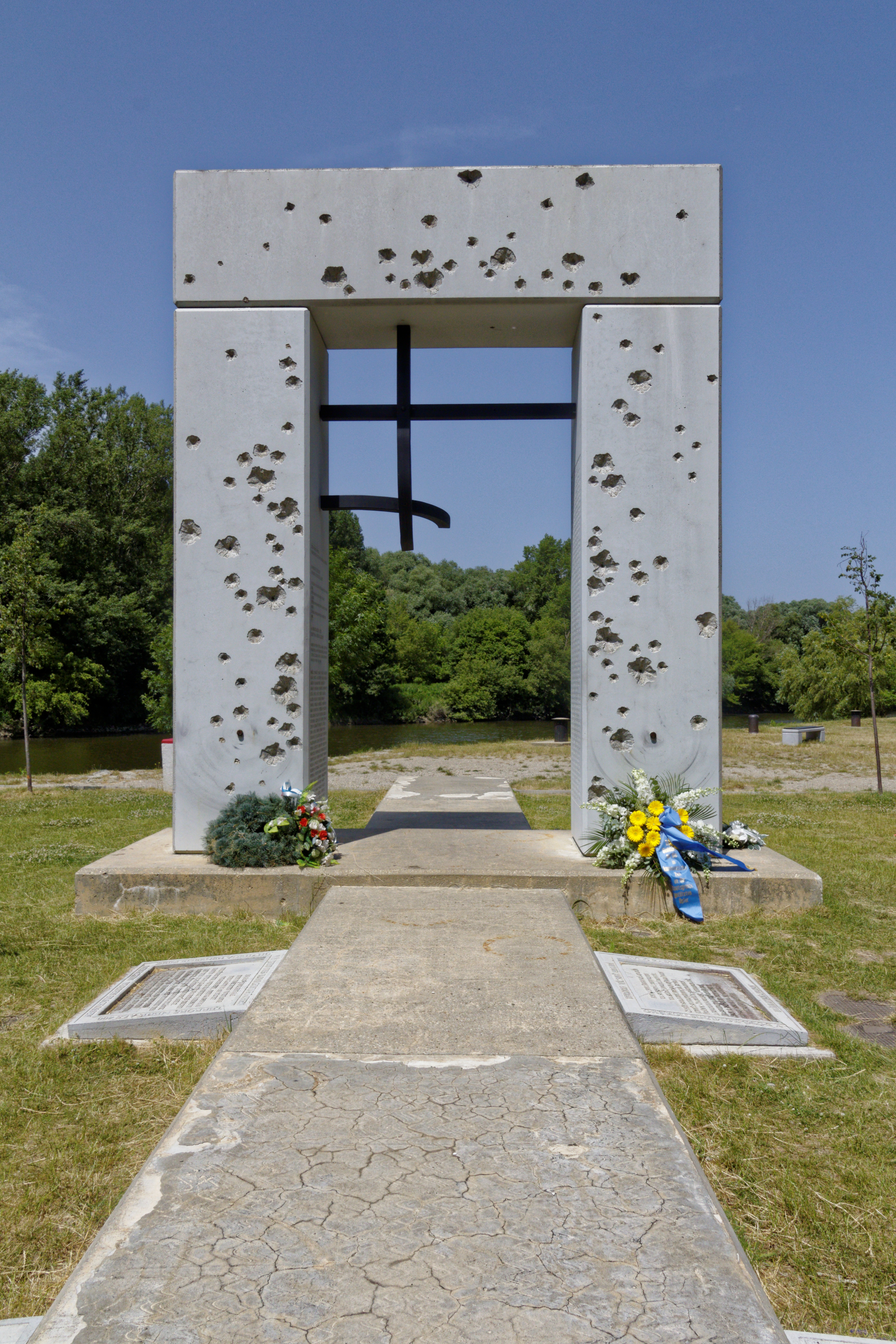 Bratislava-Devin; Denkmal für die Fluchtopfer an der Mündung der March in die Donau